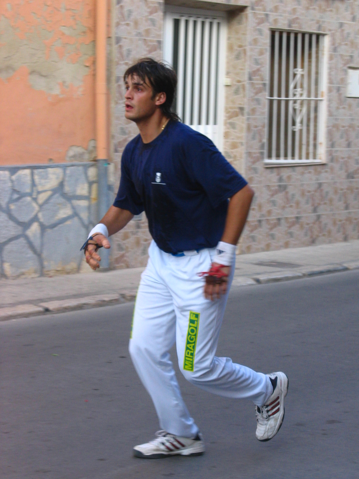 Pilotari Genovès II